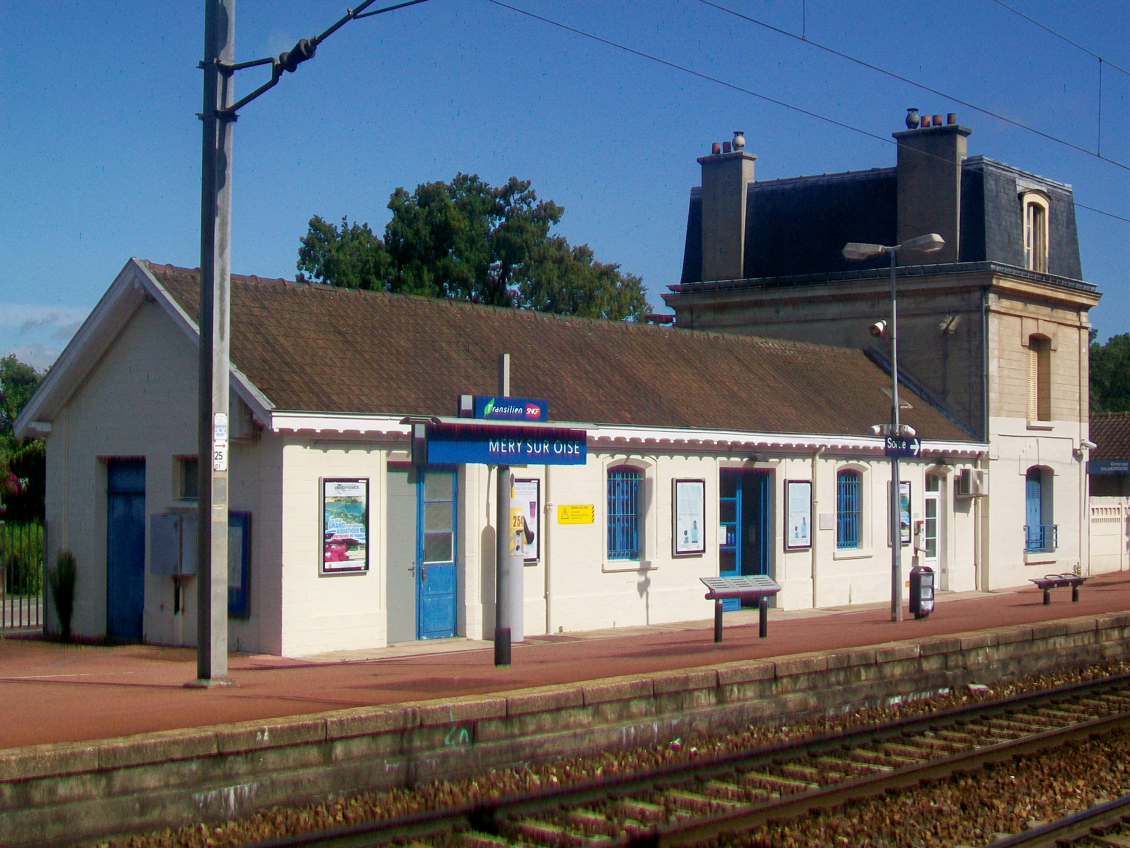 La gare de Méry-sur-Oise, côté voies.